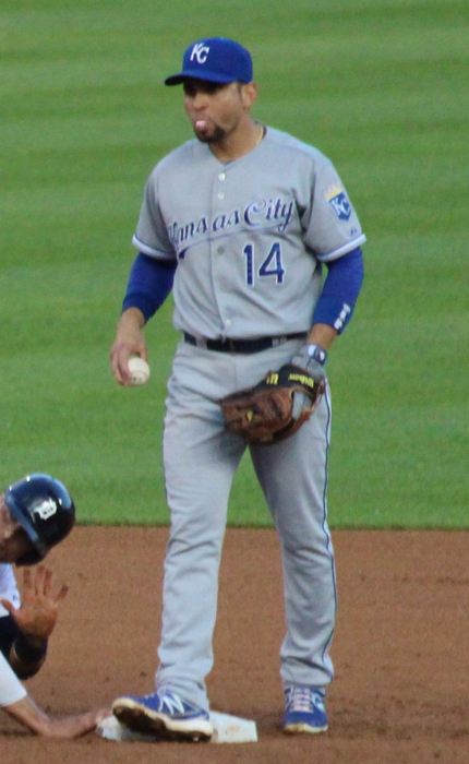 Omar Infante